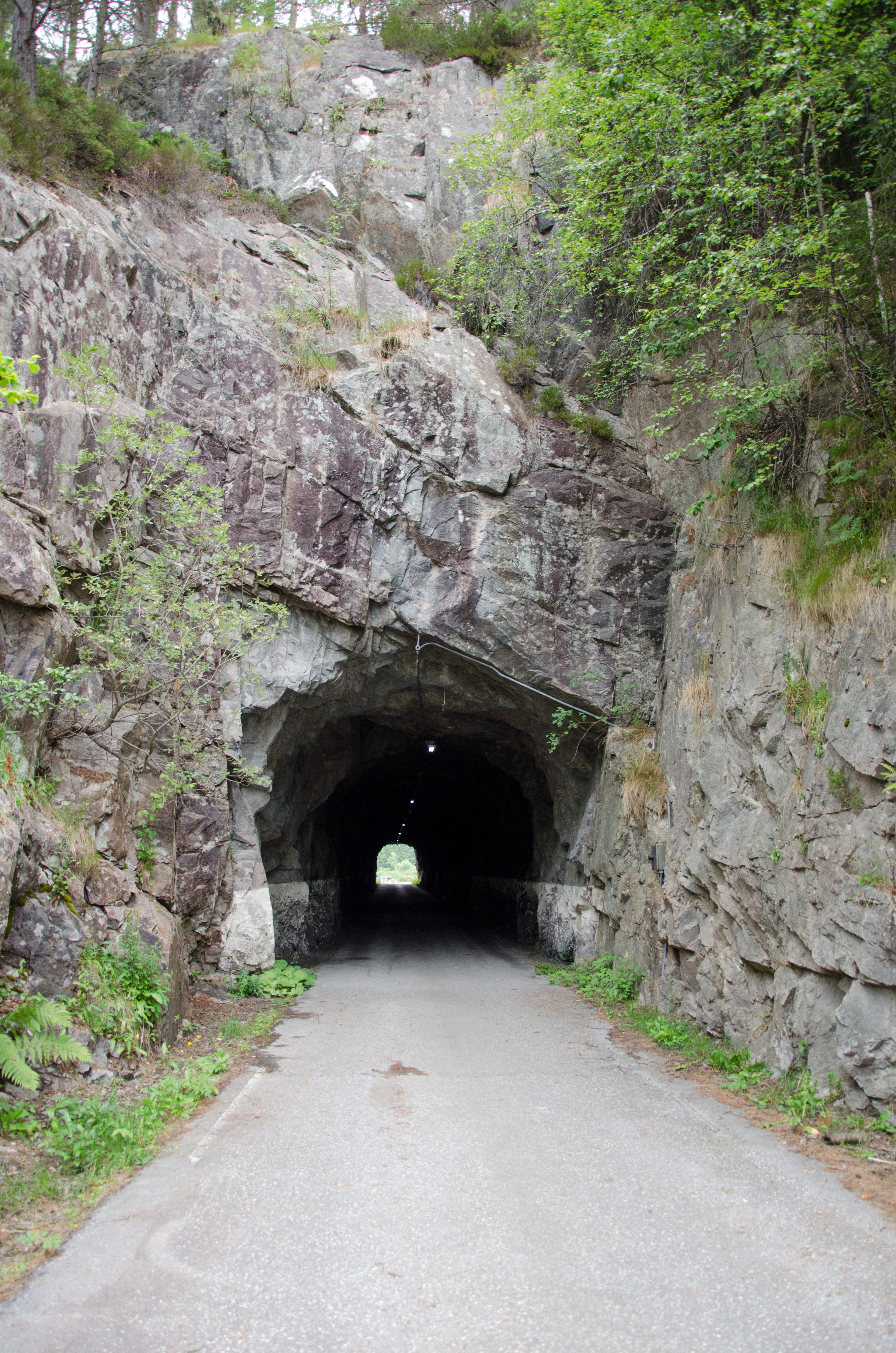 Skodjestraumtunnelen